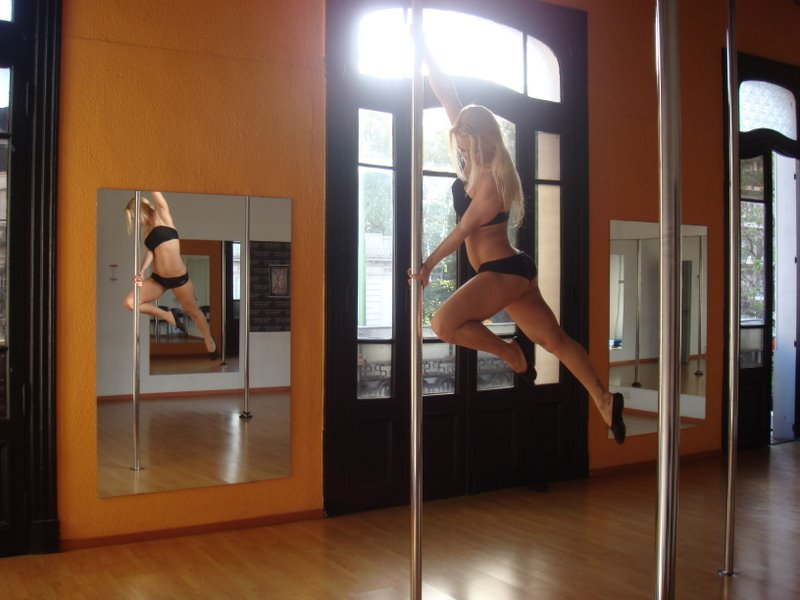 Pole dance na barra vertical